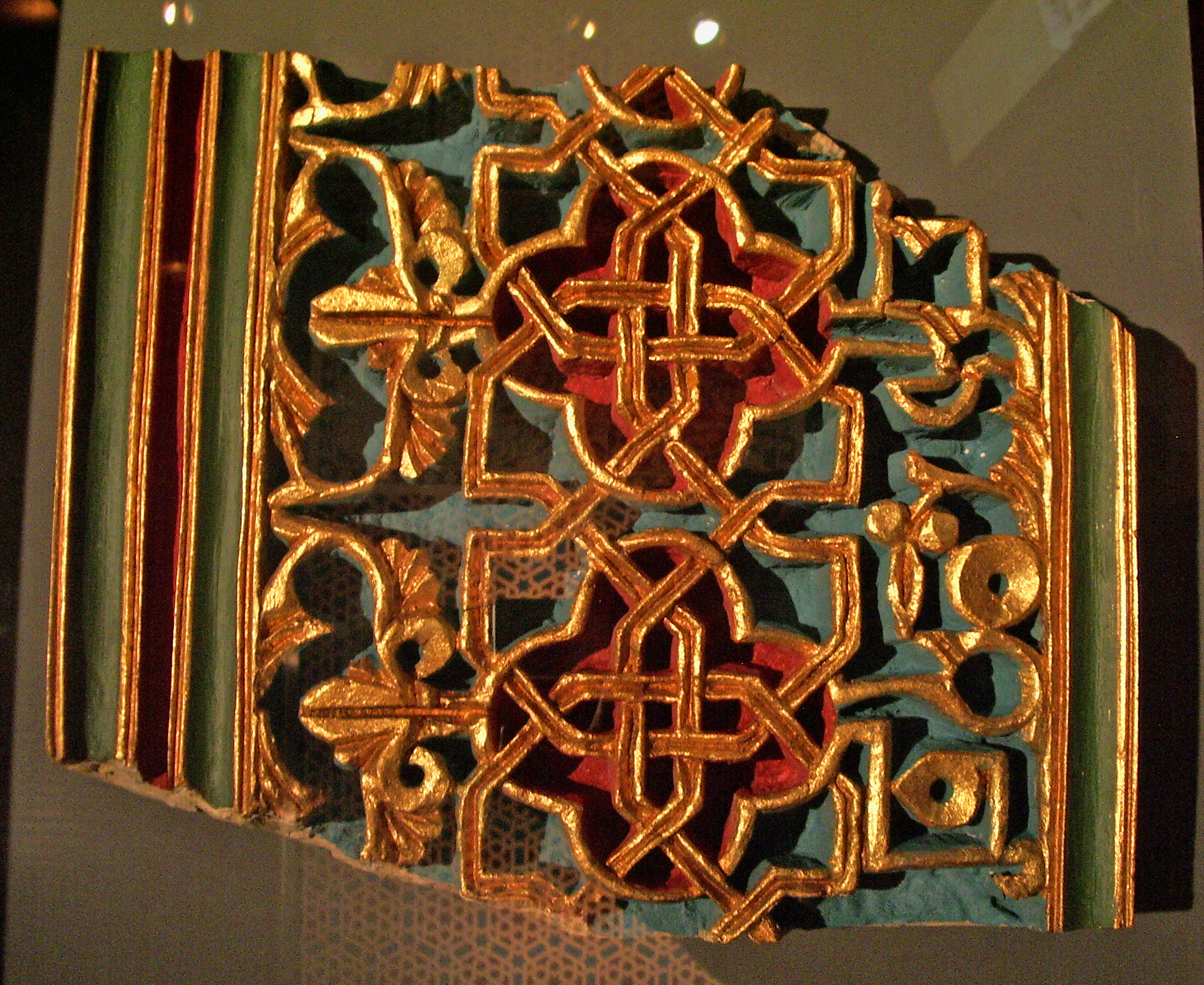 Reconstrucción de la policromía de un panel de decoración geométrica epigráfica de yeserías de la Aljafería de Zaragoza. Siglo XI.